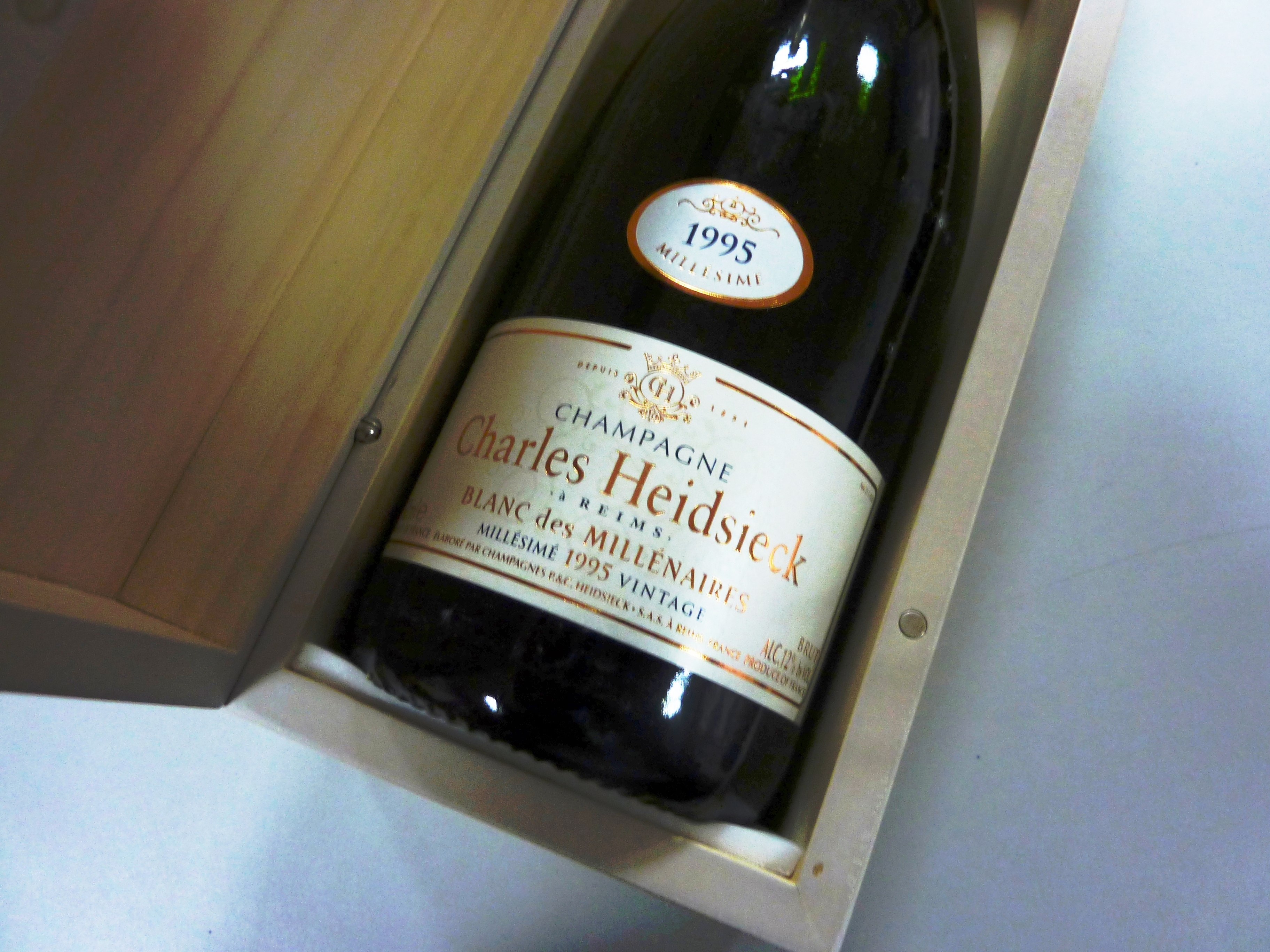 Champagne millésimé 1995 à l'Alliance française de Wuhan (